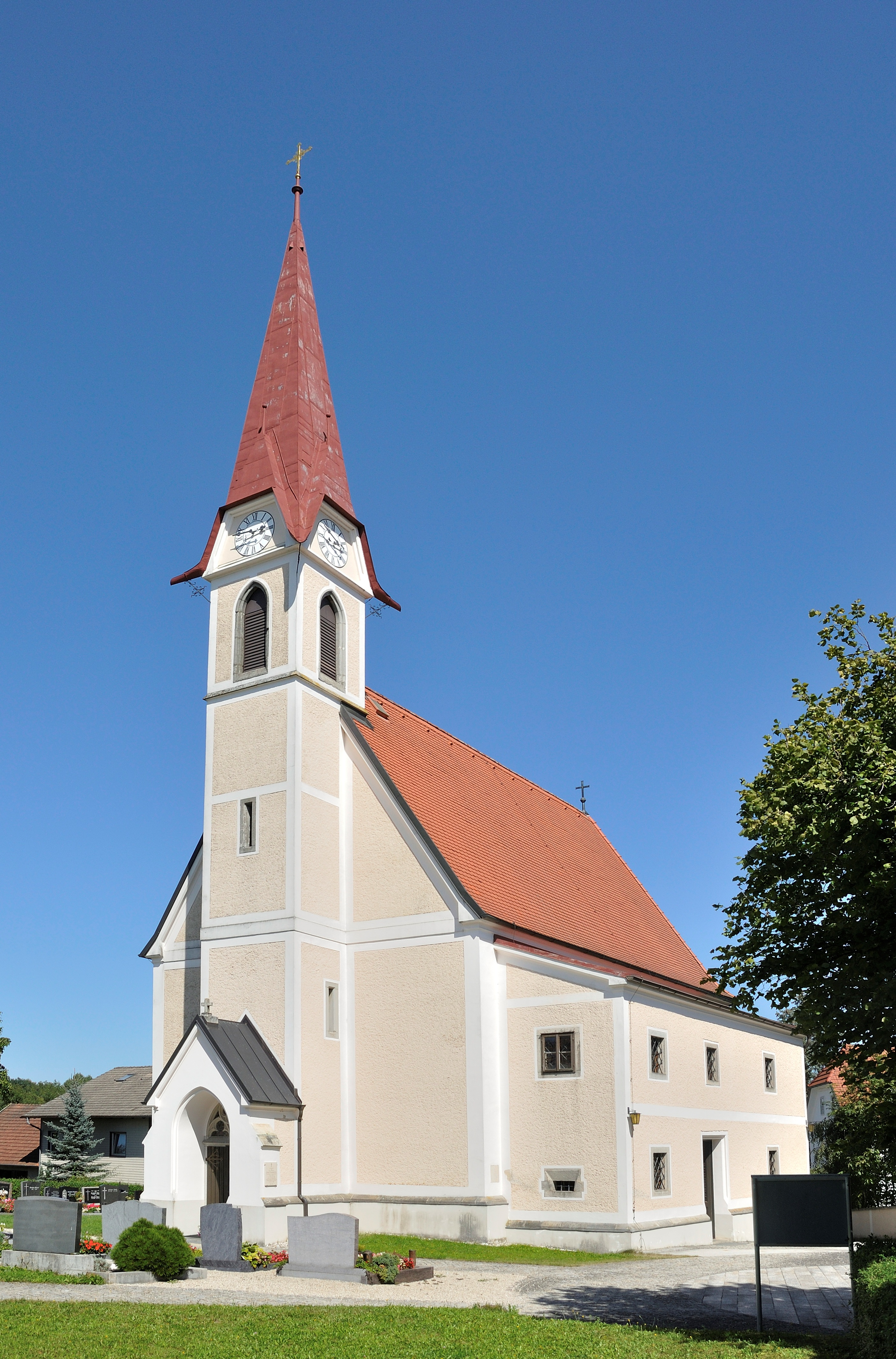 Die spätgotische Kirche von Holzhausen von Südwesten gesehen.